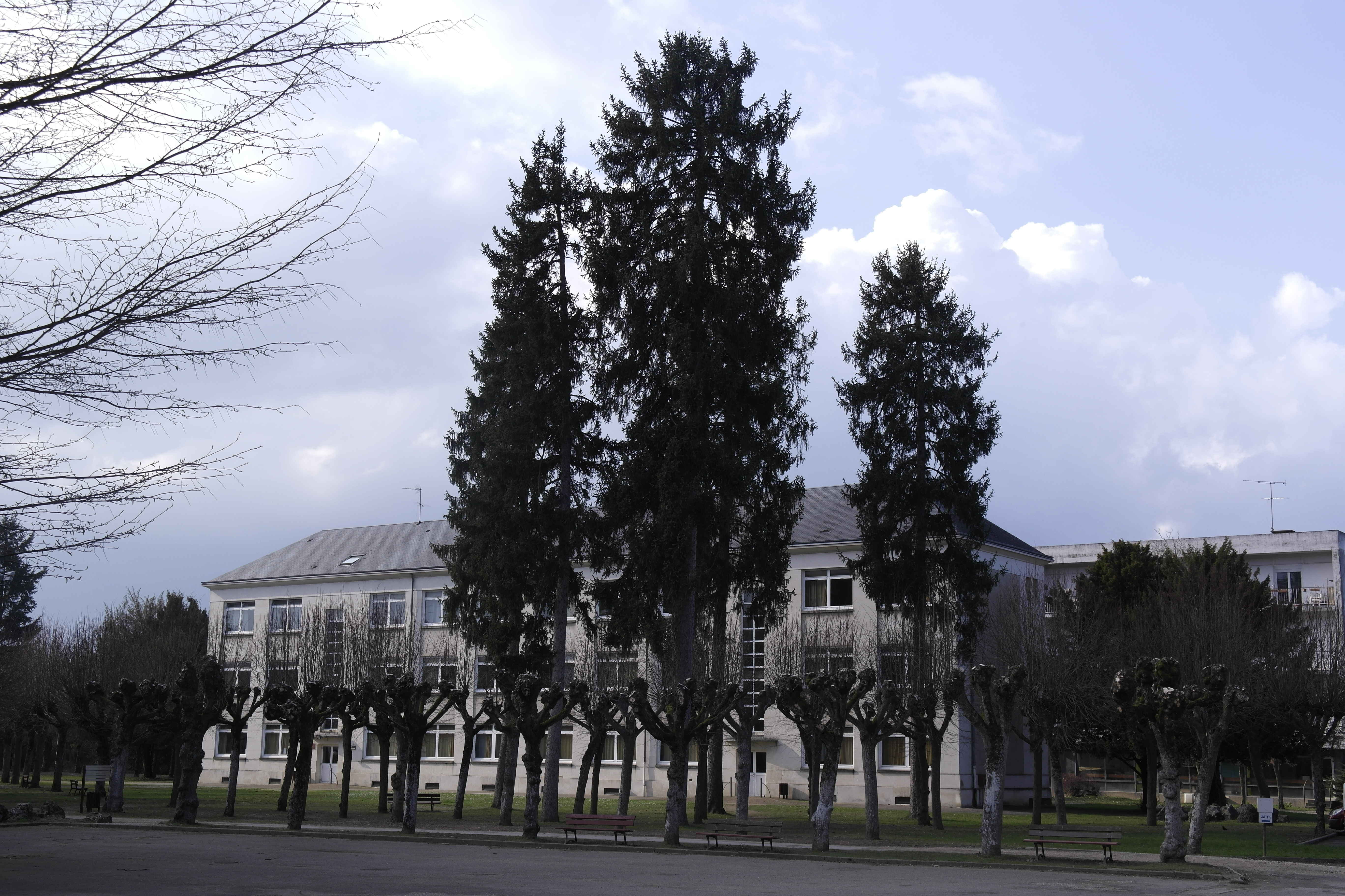 Bâtiment Lavoisier (ancien bâtiment O). Cité scolaire Augustin-Thierry